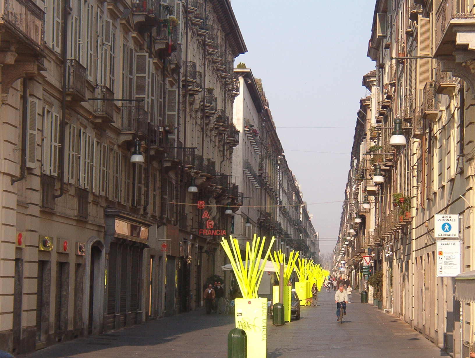 Via Garibaldi - Torino - Italia